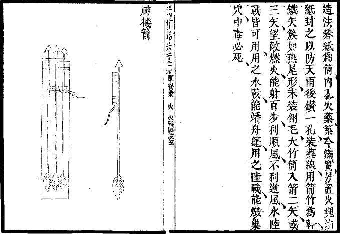 中文（台灣）: 《武备志》的神機箭